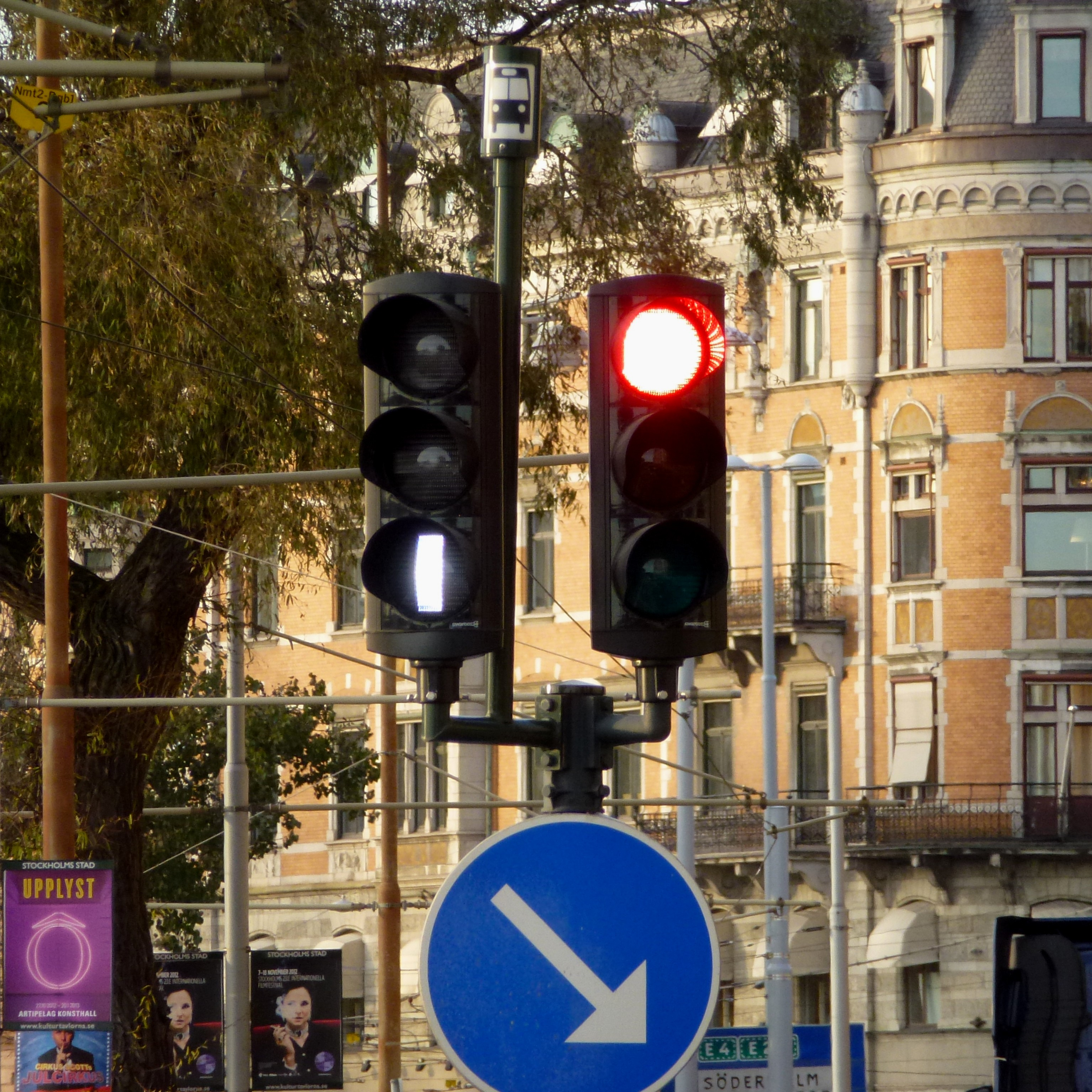 Trafiksignal för spårvagn buss samt fordonstrafik vid Nybroplan. Signalbild lodrätt sträck - fortsätt framåt